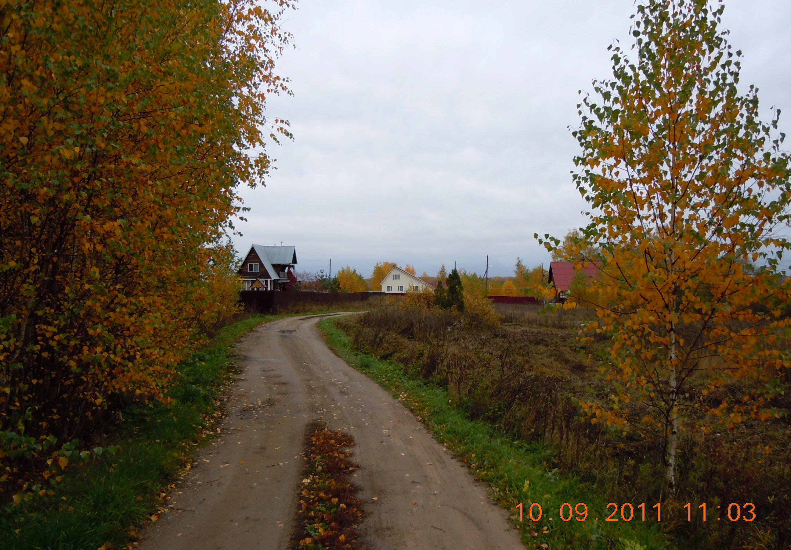 Грунтовая дорога в Лиственный